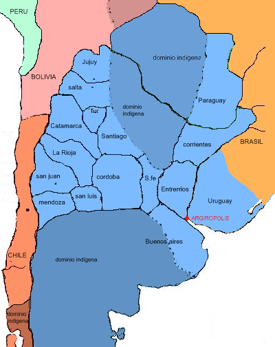 mapa de la propuesta de sarmiento para unos utópicos EE UU del Plata trabajo propio basado en Mapa 1850.png también trabajo propio 2007 pruxo